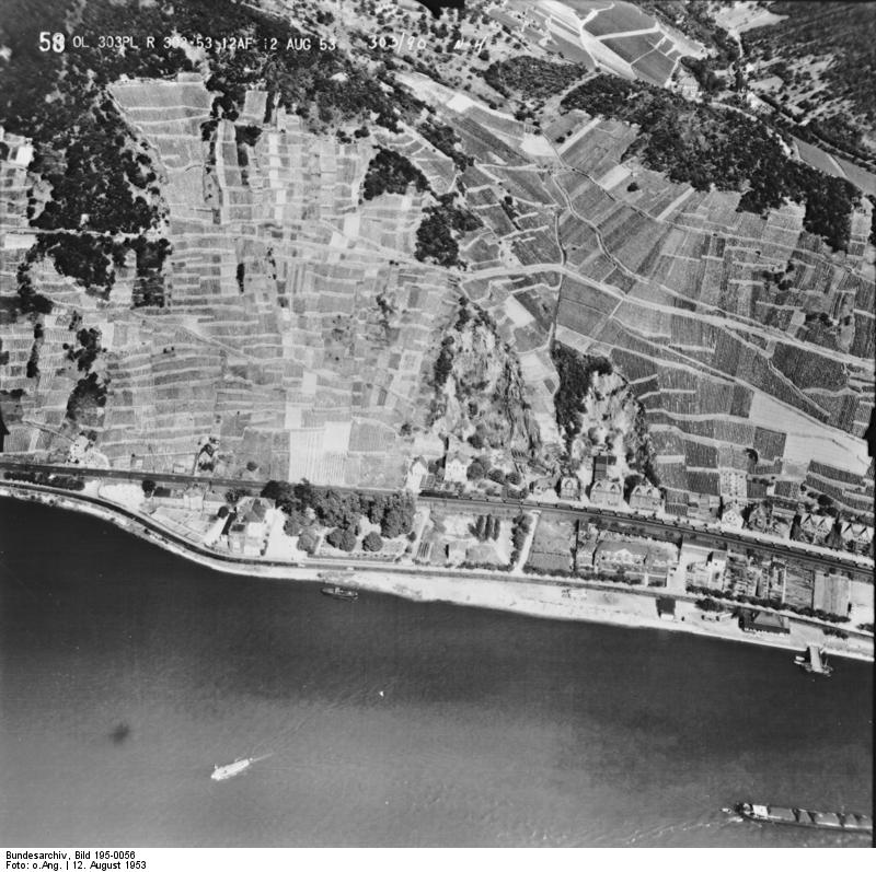 Rheinbefliegung der Alliierten 1953